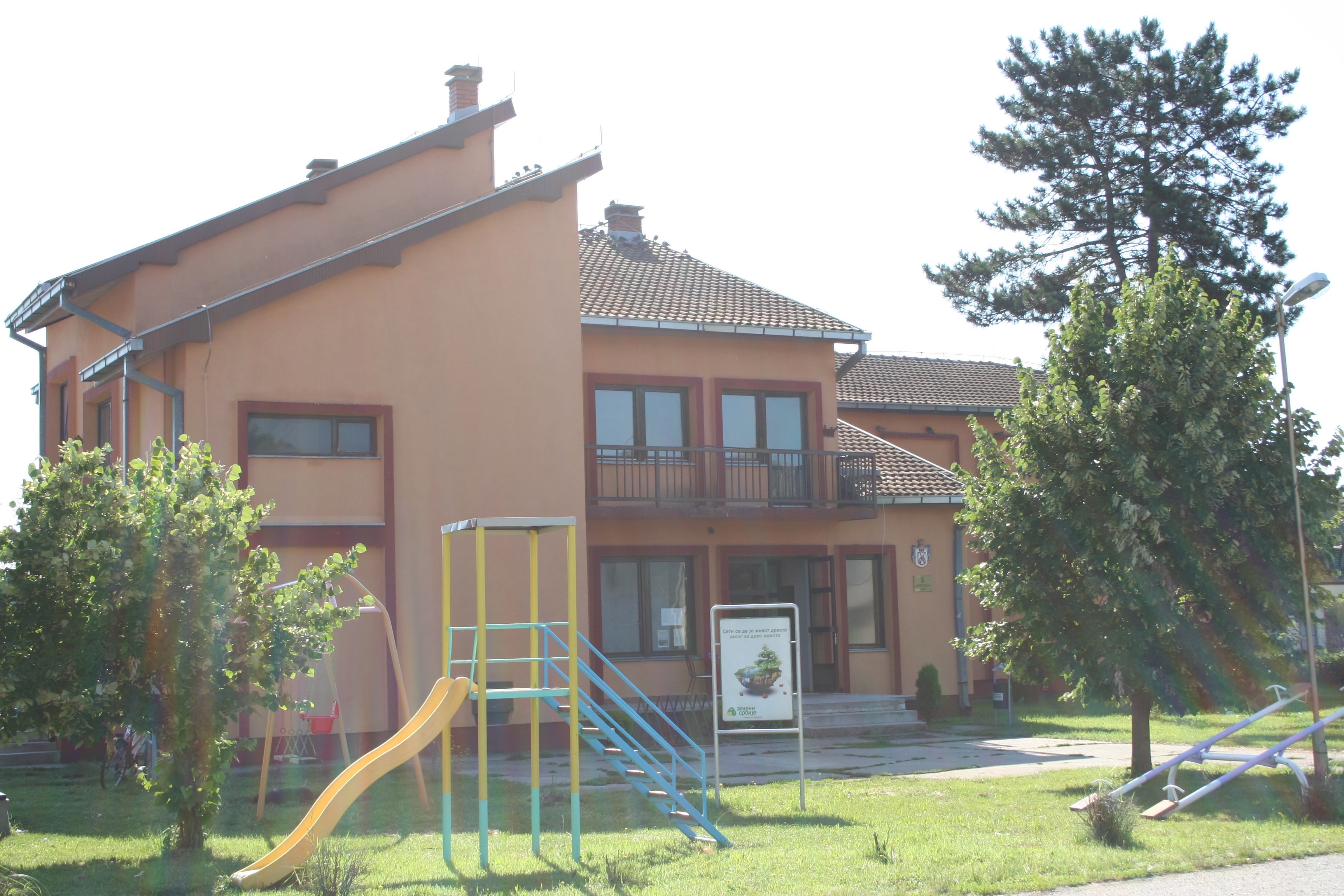 Dom kulture, Uzveće